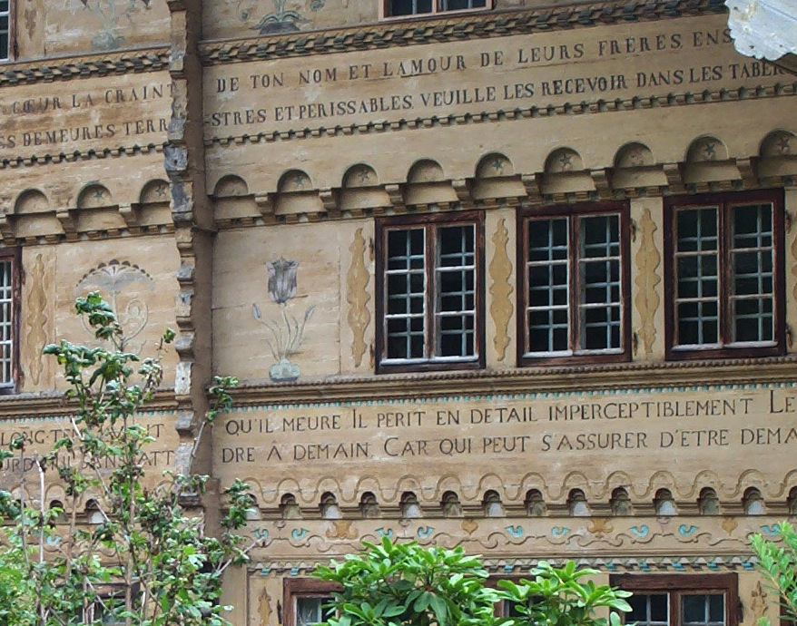 Chalet de Rossinière : inscriptions gros plan